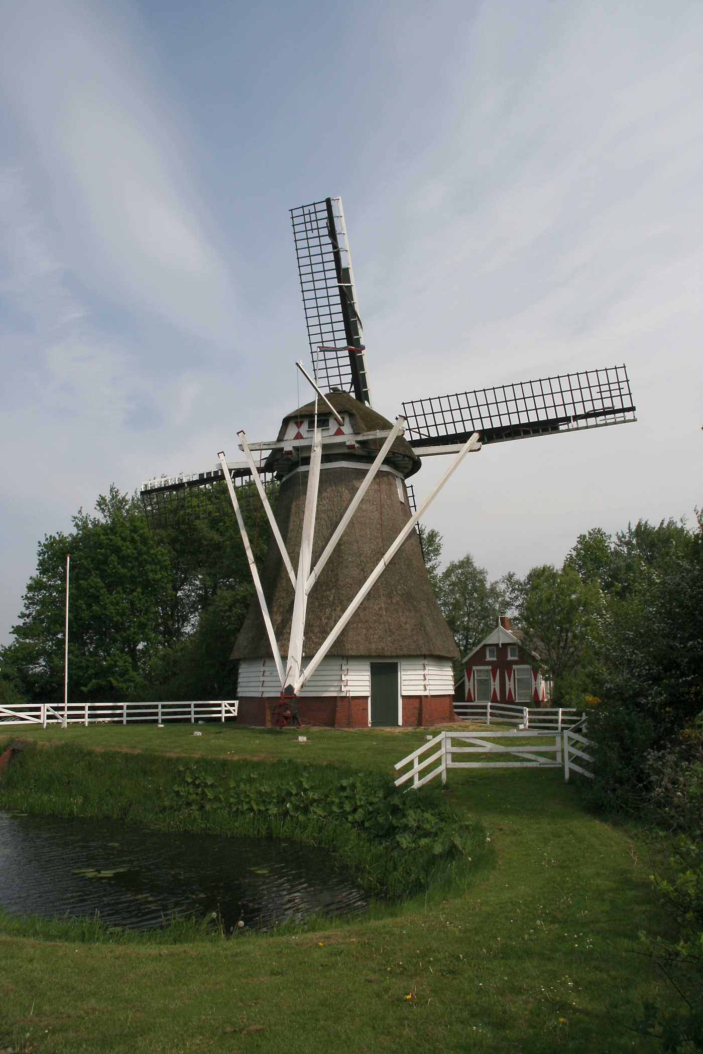 Slochteren: Molen De Ruiten, gezien vanaf de Groenedijk